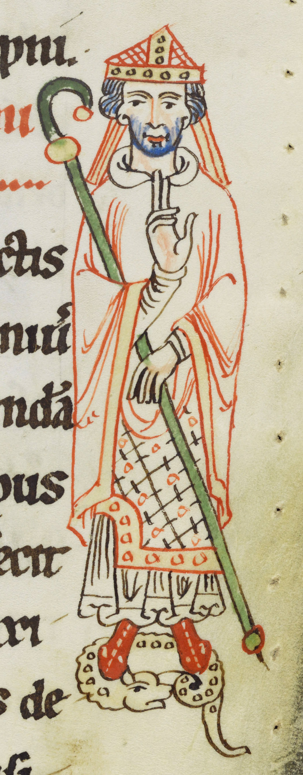 Acta Sancti Petri in Augia; St. Gallen, Kantonsbibliothek, Vadianische Sammlung, VadSlg Ms. 321, S. 63, Bischof Diethlem von Krenkingen